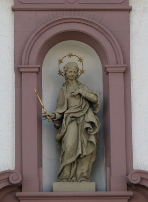 St.-Peter-und-Paul-Kirche in Mannheim-Feudenheim